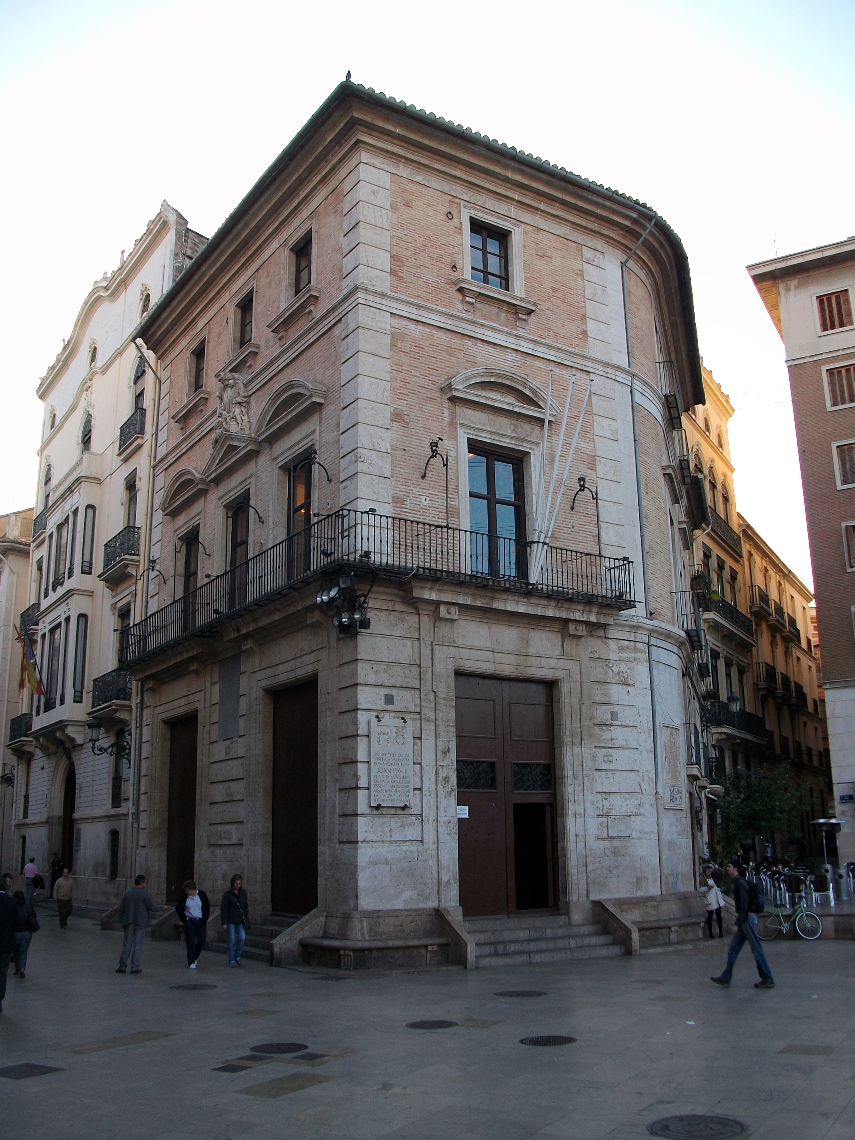 Casa Vestuari, on es preparen els membres del Tribunal de les Aigües de València.